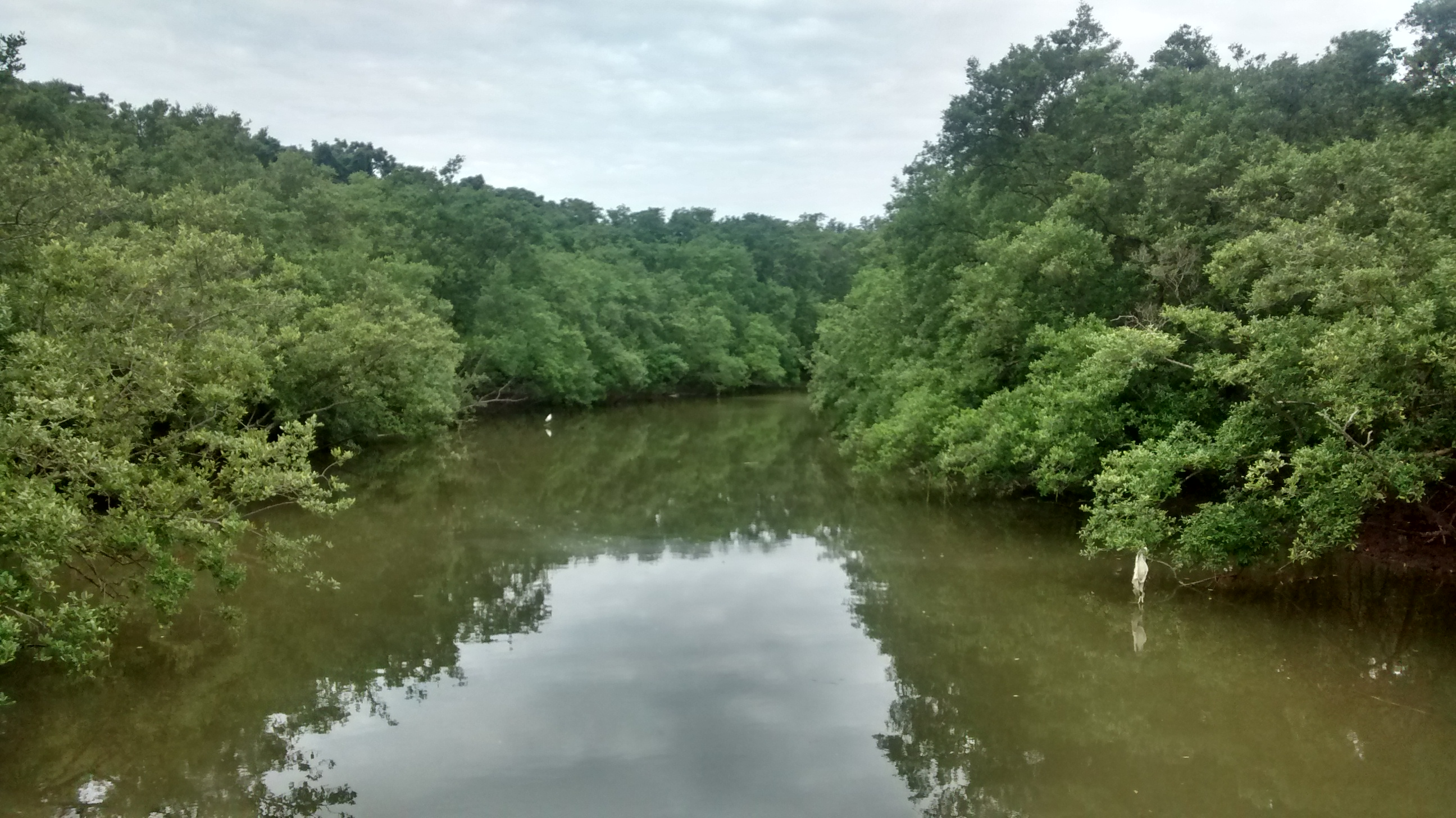 Foto tirada na beira da avenida em uma ponte.